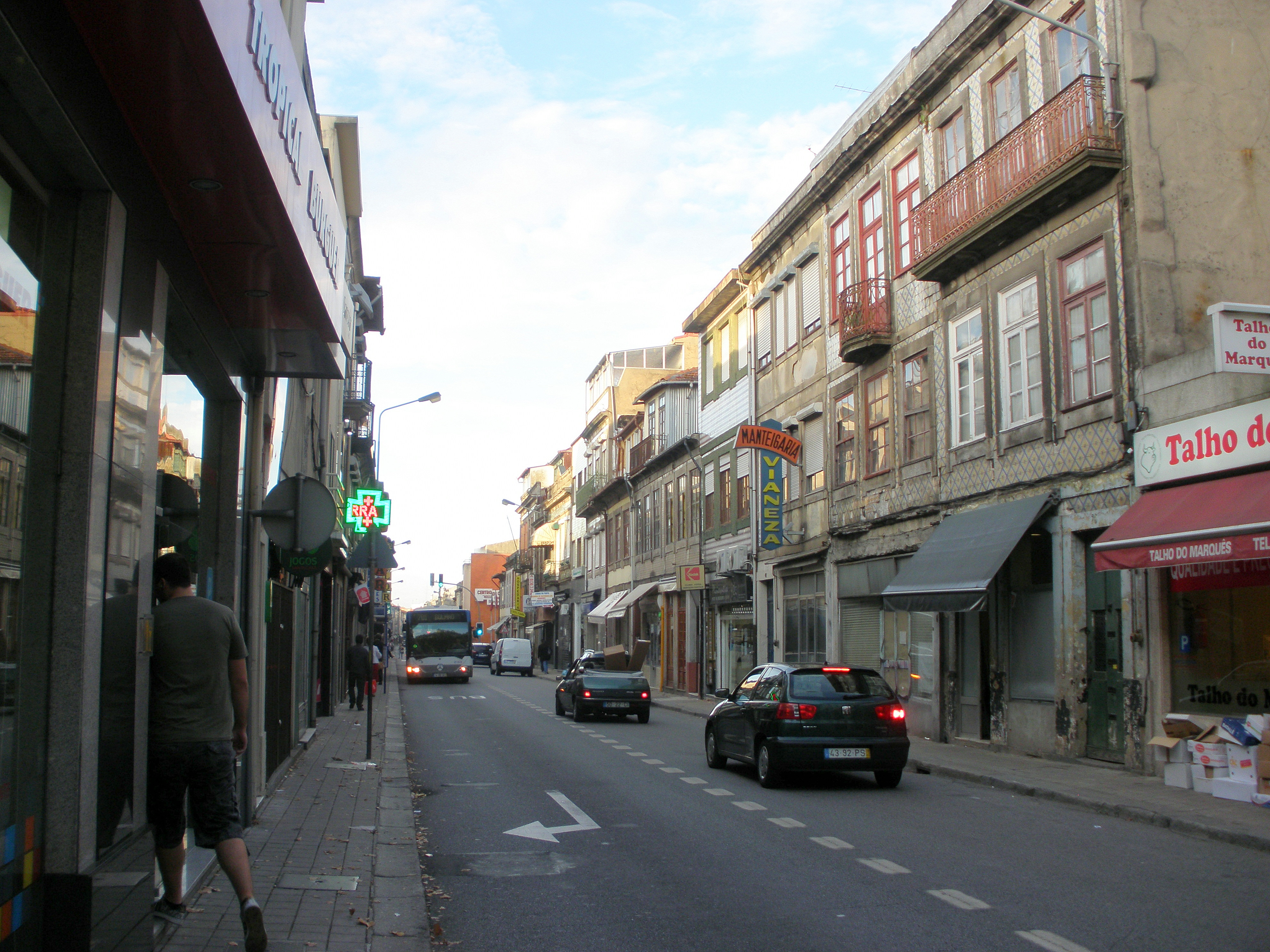 Rua de Costa Cabral, Porto, Portugal.